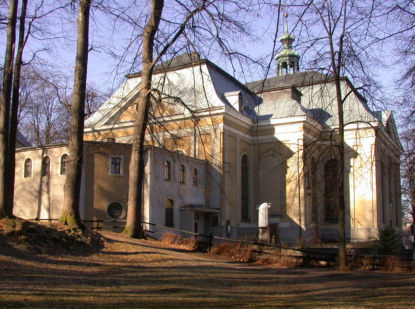 Kościół pod wezwaniem Matki Bożej Różańcowej w Kamiennej Górze. Zdjęcie wykonane przed 2003-02-08.